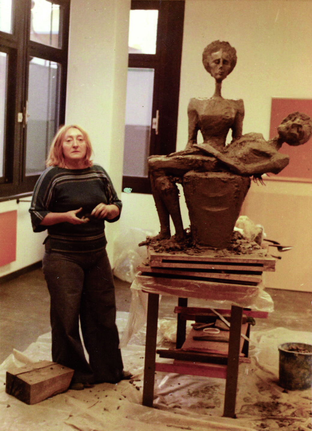 Pieta domului catolic din Emmerich/Germnia, faza de lucru.